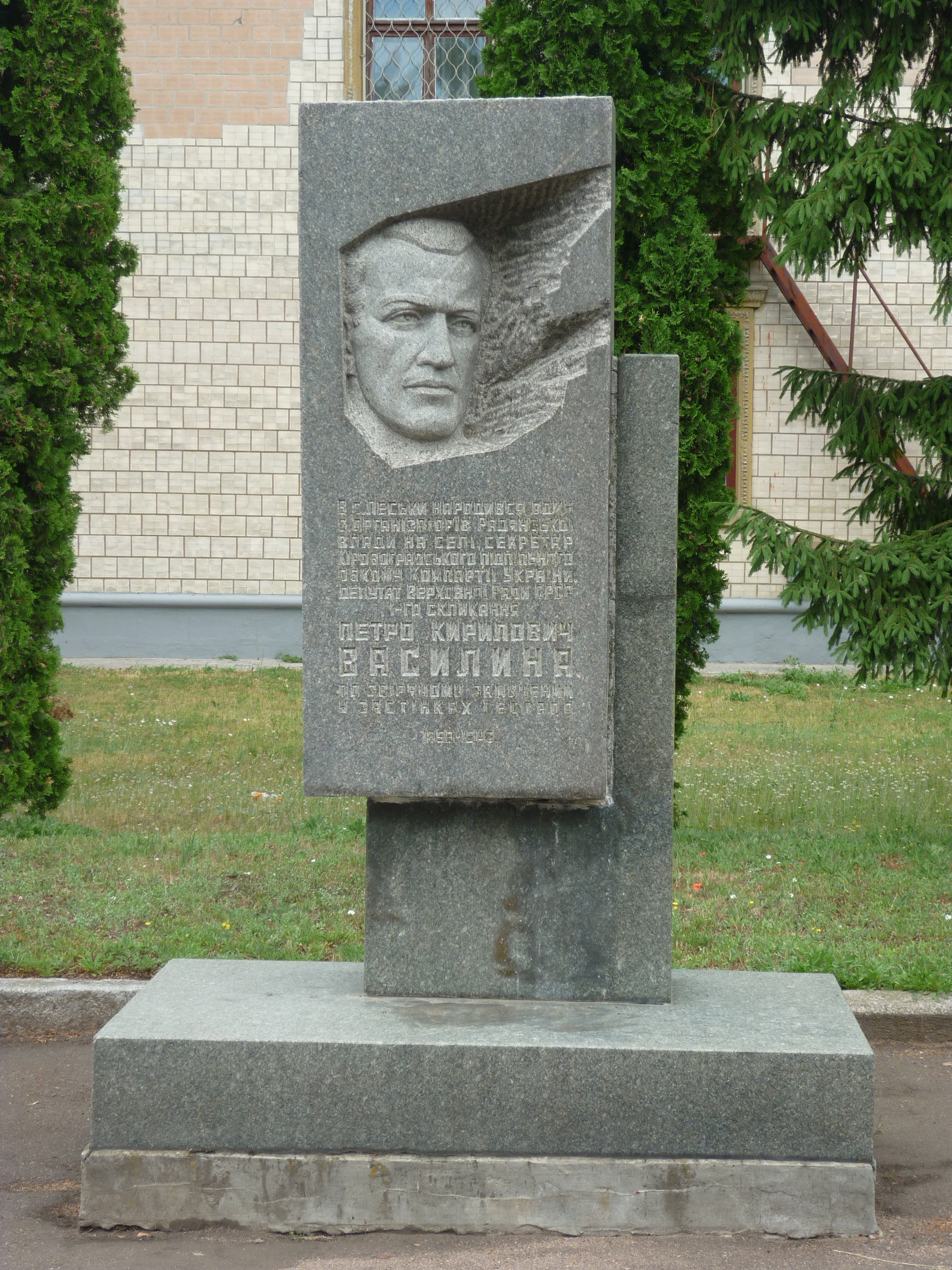 село Леськи Черкаського району Черкаської області, Україна